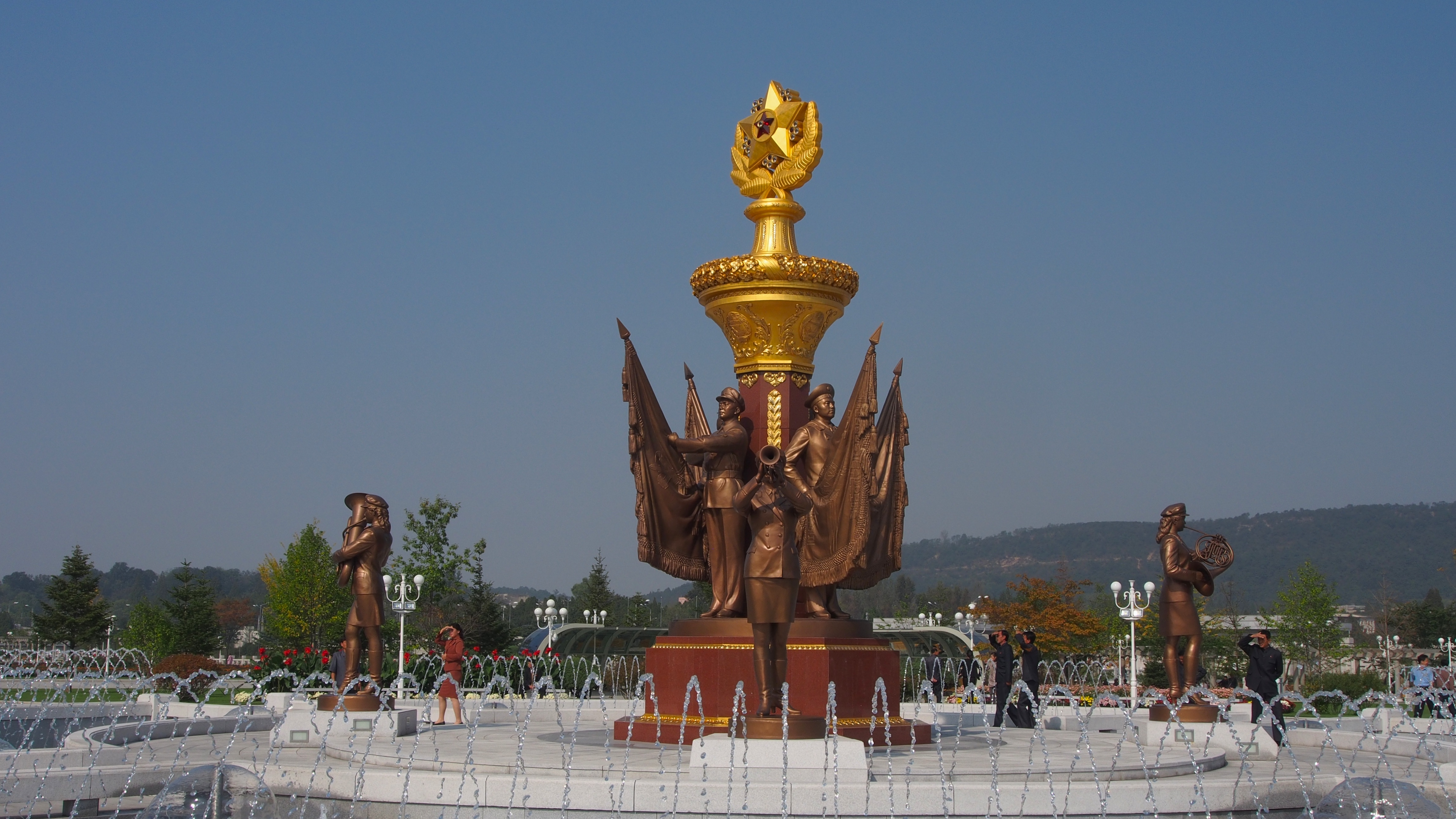 Pyongyang DPRK